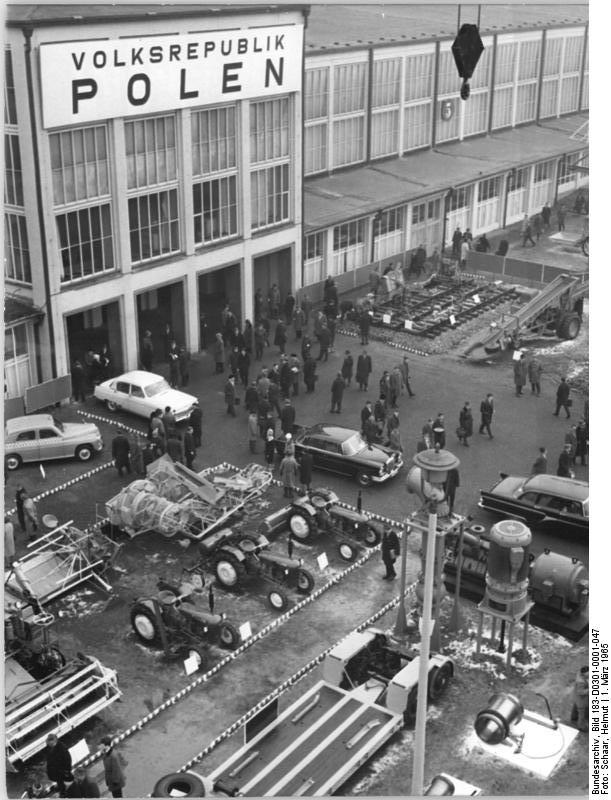 Zentralbild Schaar Tre-Sz 1.3.65 Leipziger Jubiläumsmesse 1965 Aus dieser Perspektive zeigt unser Bildreporter einen Blick auf die polnische Kollektivausstellung.